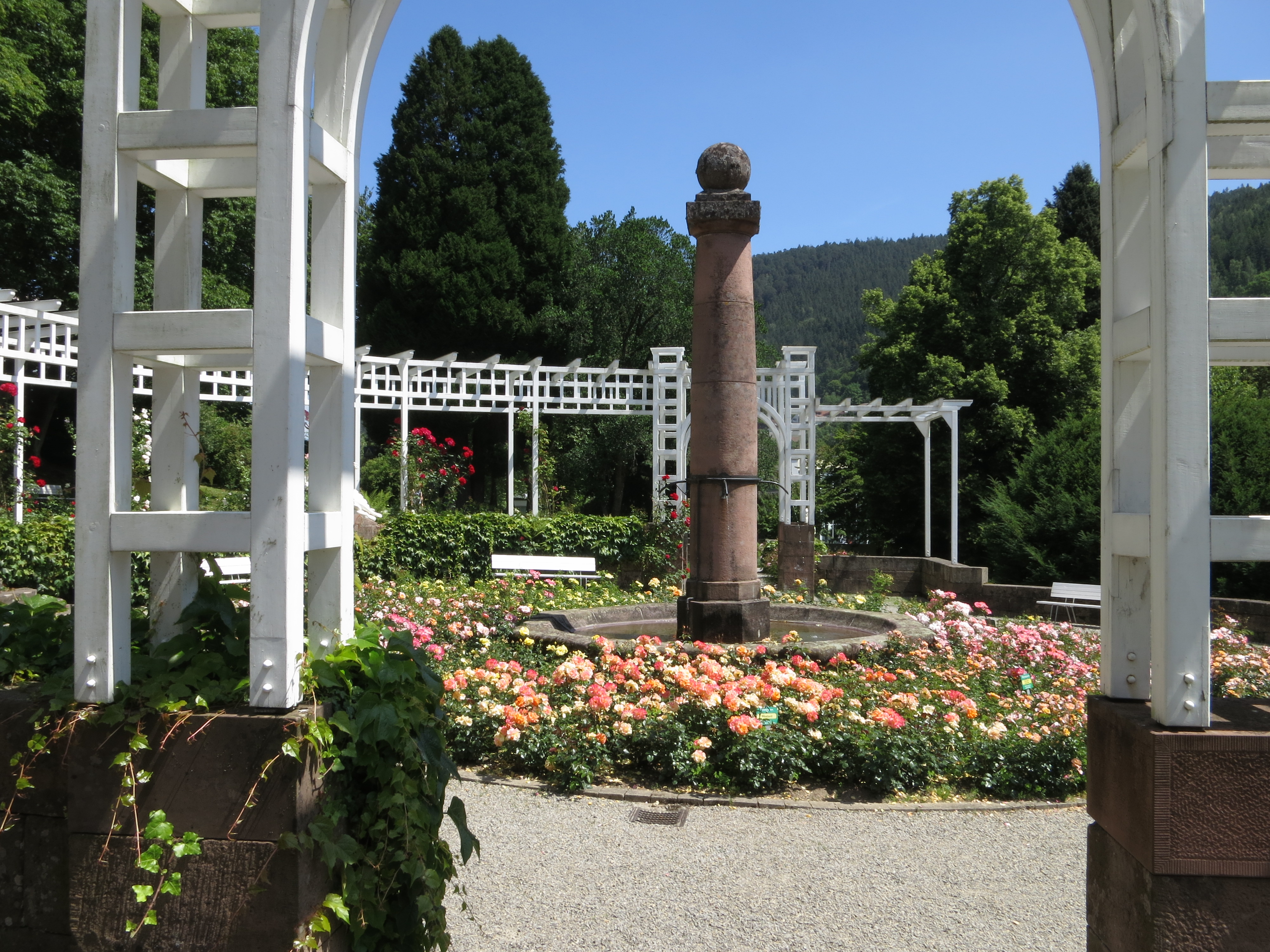 Rosengarten im Kurpark Bad Wildbad.